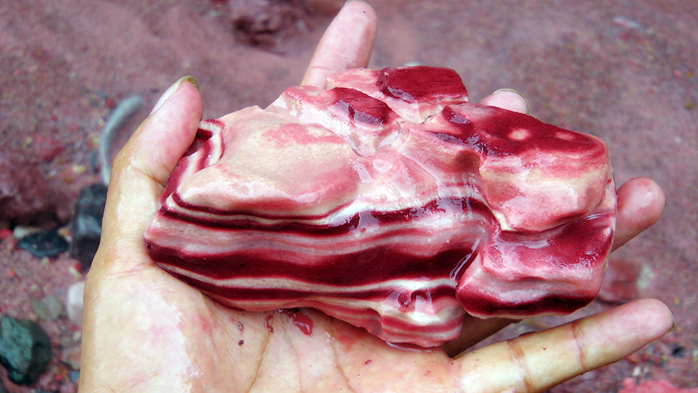 Piedra con forma y color de carne